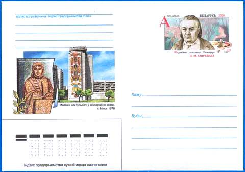 Конверт № 81 с оригинальной маркой "75 лет со дня рождения Кищенко А. М.", подготовленный ИЦ "Марка" РУП "Белпочта". Художник Николай Рыжий. Иллюстрация - мозаика на здании в микрорайоне Восток. г. Минск 1978 — на бел. языке, фрагмент мозаики. Дата выпуска конверта - 25.06.2008.